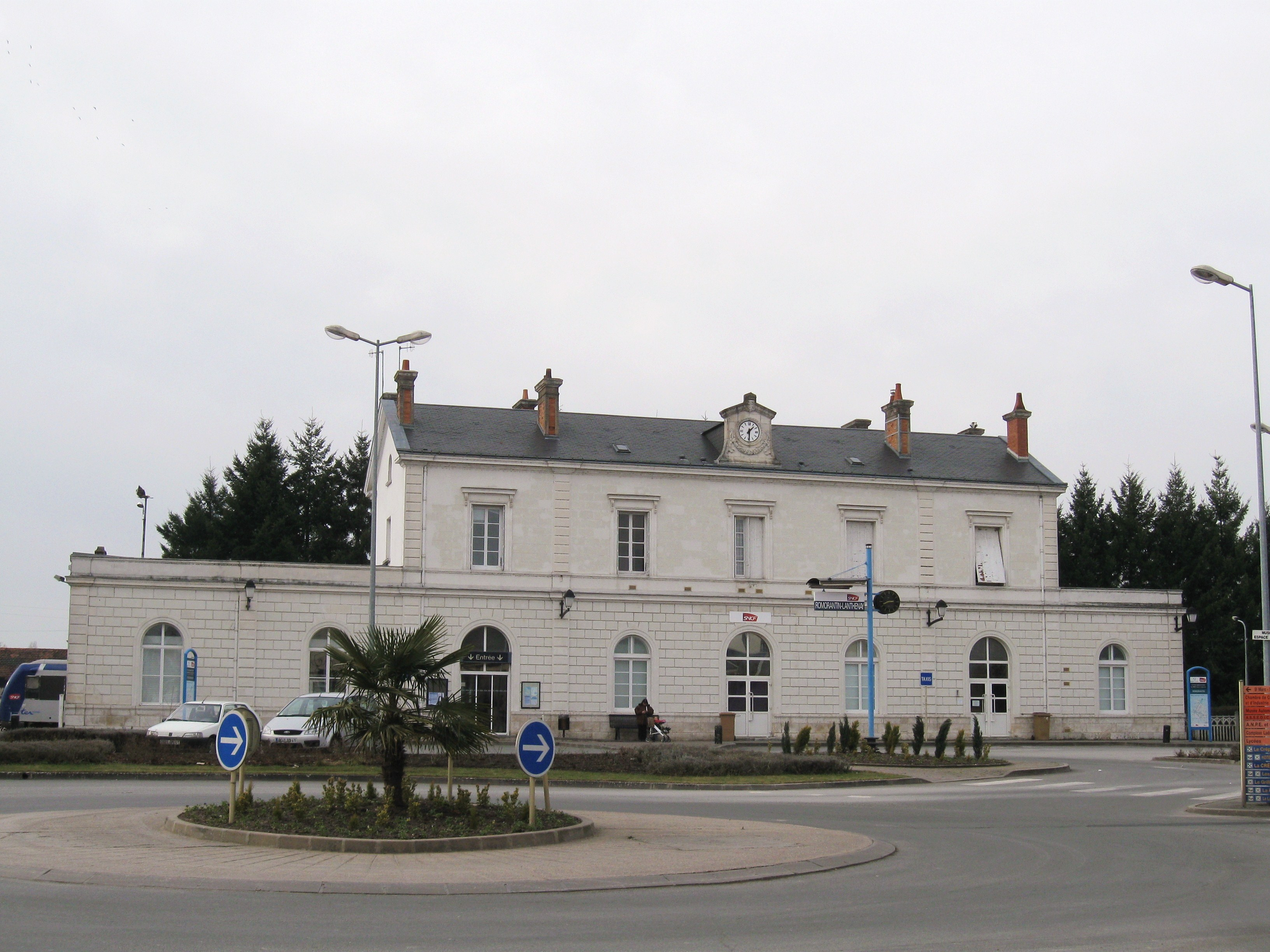 Gare de Romorantin-Blanc-Argent, Romorantin-Lanthenay, Loir-et-Cher, France